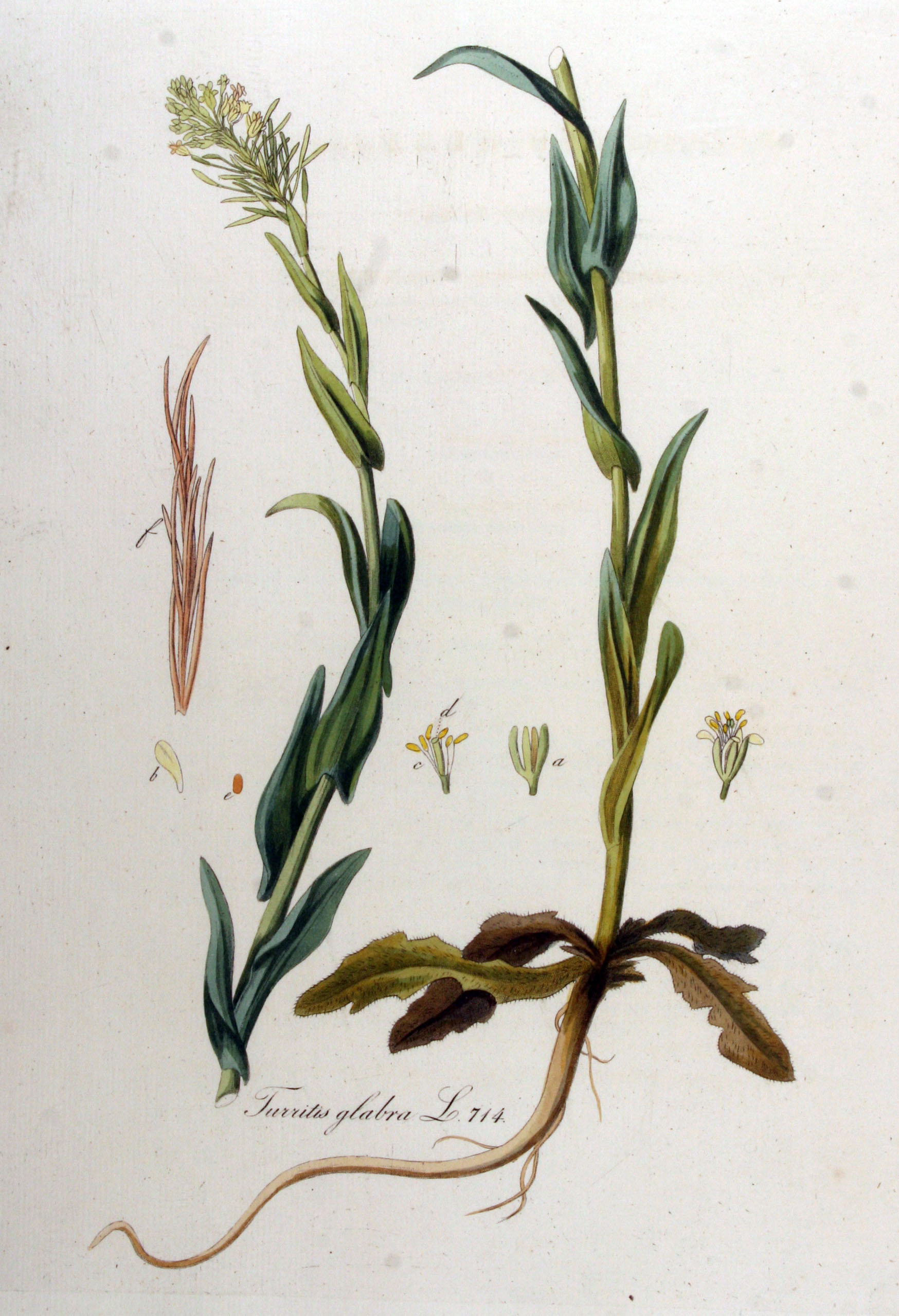 Turritis glabra L. (Syn. Arabis glabra (L.) Bernh.)